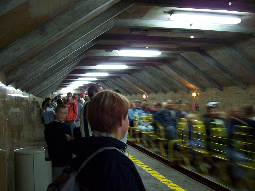 Cave train in Postojnska Jama